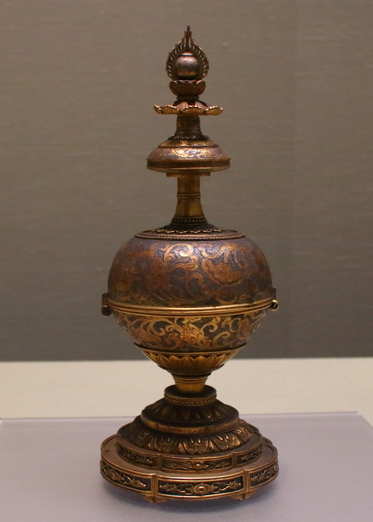 金銅能作生塔（国宝）、鎌倉時代・13世紀の作。奈良県・長福寺所蔵、東京国立博物館にて展示。